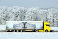 LKW Verkehr in Embrach